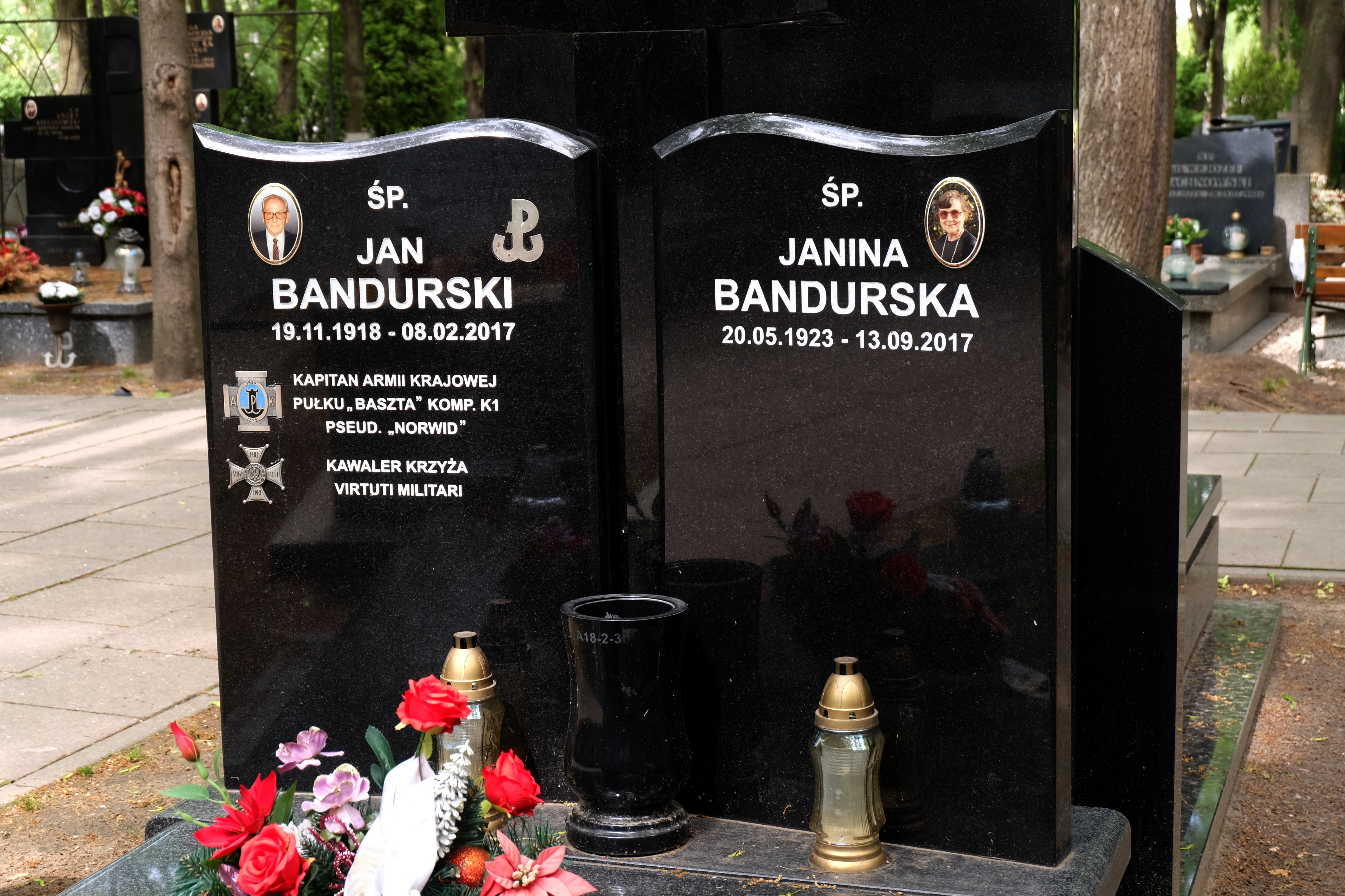 Grób uczestnika powstania warszawskiego Jana Bandurskiego ps. "Nikodem" na Cmentarzu Wojskowym na Powązkach w Warszawie